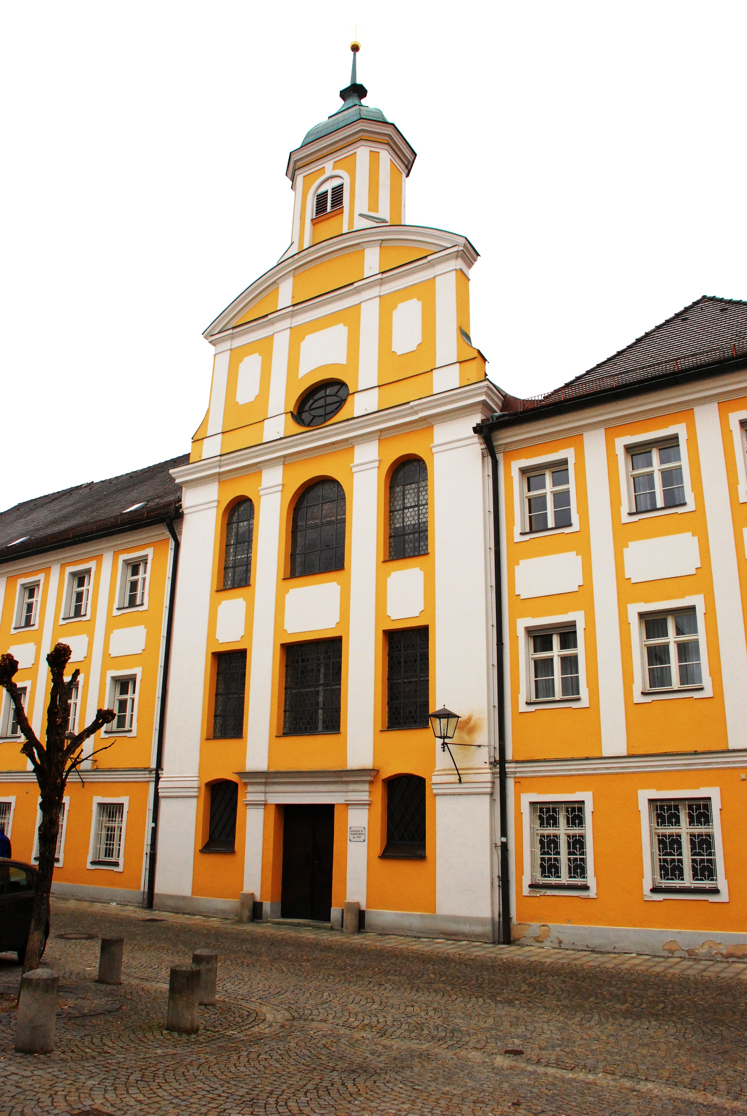 Fassade der Kirche St. Joseph (neuerdings Vermählung Mariä) in der Neuöttinger Straße 8 in Altötting, Landkreis Altötting, Regierungsbezirk Oberbayern, Rokoko-Saalkirche der Congregatio Jesu, vormals der Englischen Fräulein. Als Baudenkmal unter Aktennummer D-1-71-111-49 in der Bayerischen Denkmalliste aufgeführt. Laut Denkmalliste erbaut in den Jahren 1735-1737.